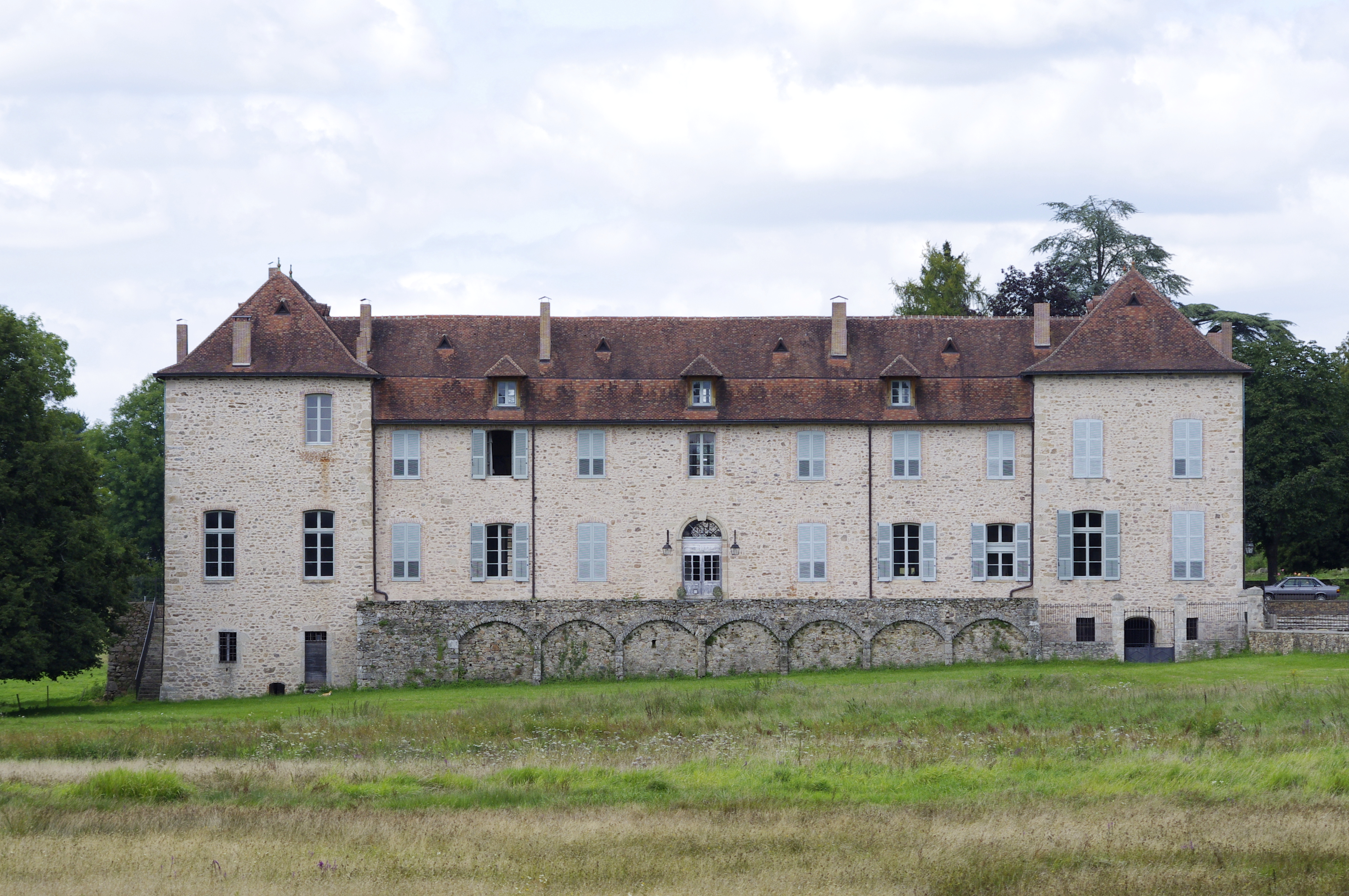 Château de Gorre, Haute Vienne.